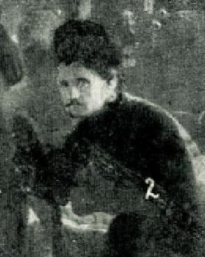 Нечипір Данилович Губа (9 лютого 1892, станція Гришине Бахмутського повіту Катеринославської губернії -нині місто Покровськ - † ?) - сотник Армії УНР.